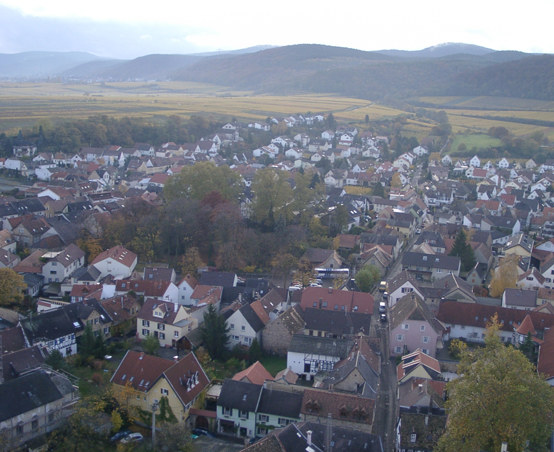 Westlicher Teil Deidesheim, im Hintergrund der Pfälzerwald